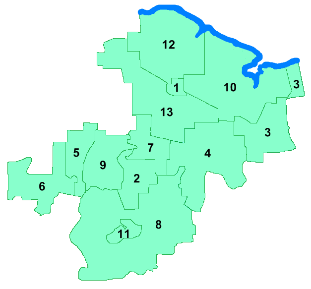 Raion de Kirov